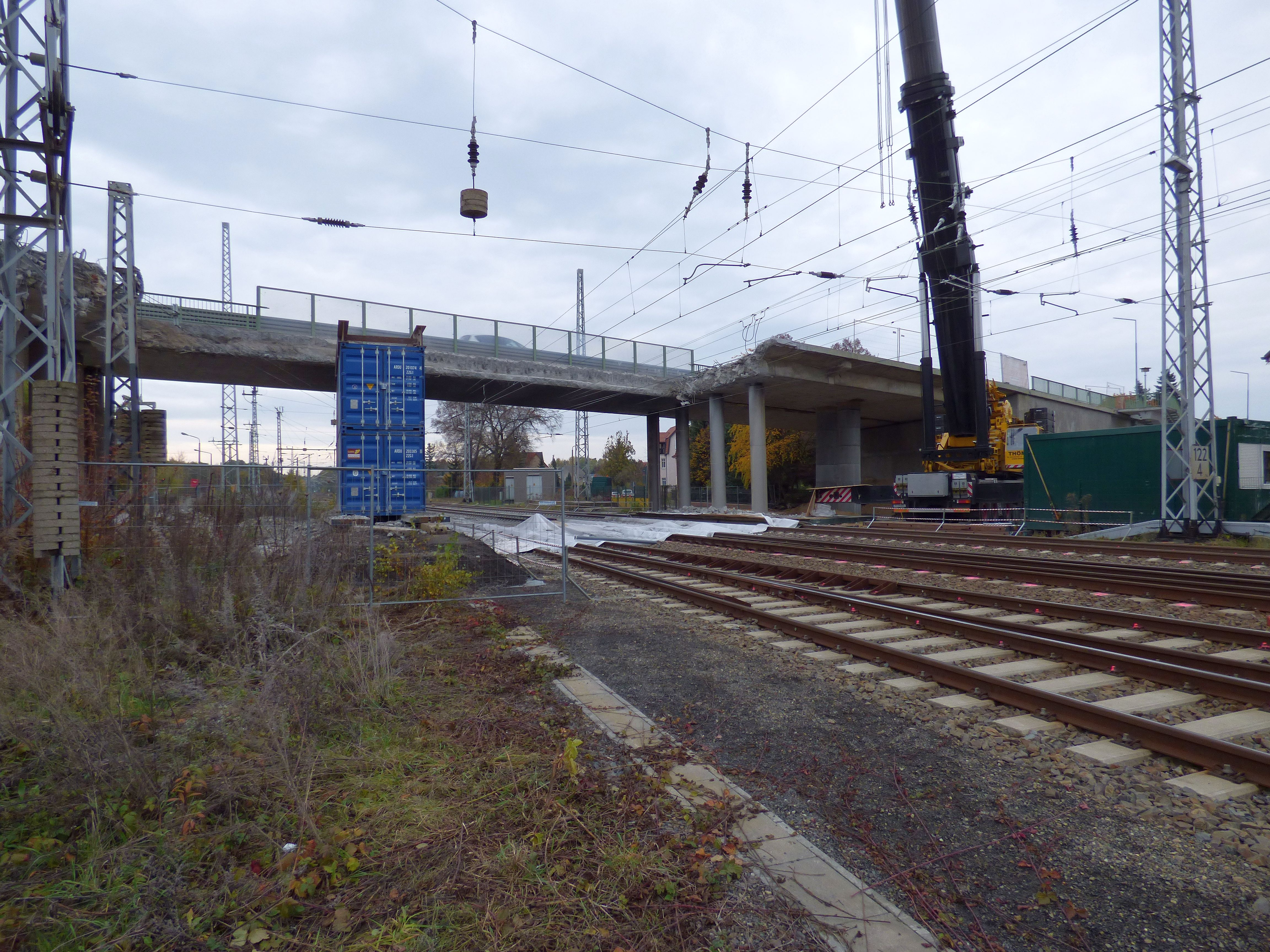 Abriss der Brücke über die Bahnstrecke Berlin-Dresden im Bereich des Bahnhofs Elsterwerda.